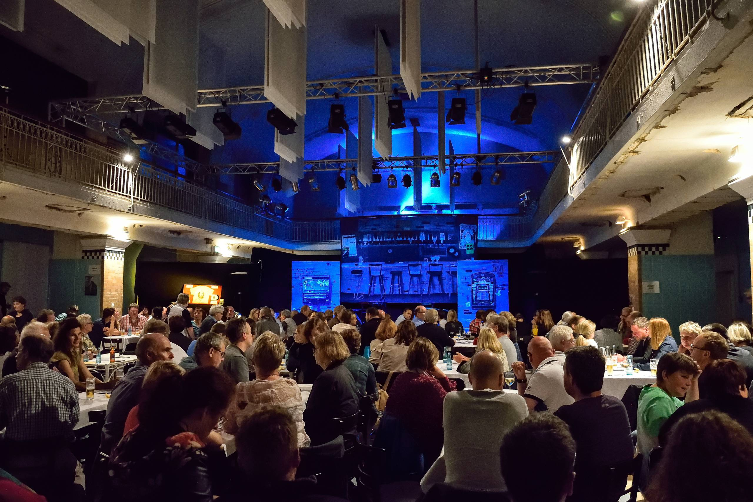 Das Becken wurde abgedeckt und die Schwimmhalle ist jetzt der Theatersaal